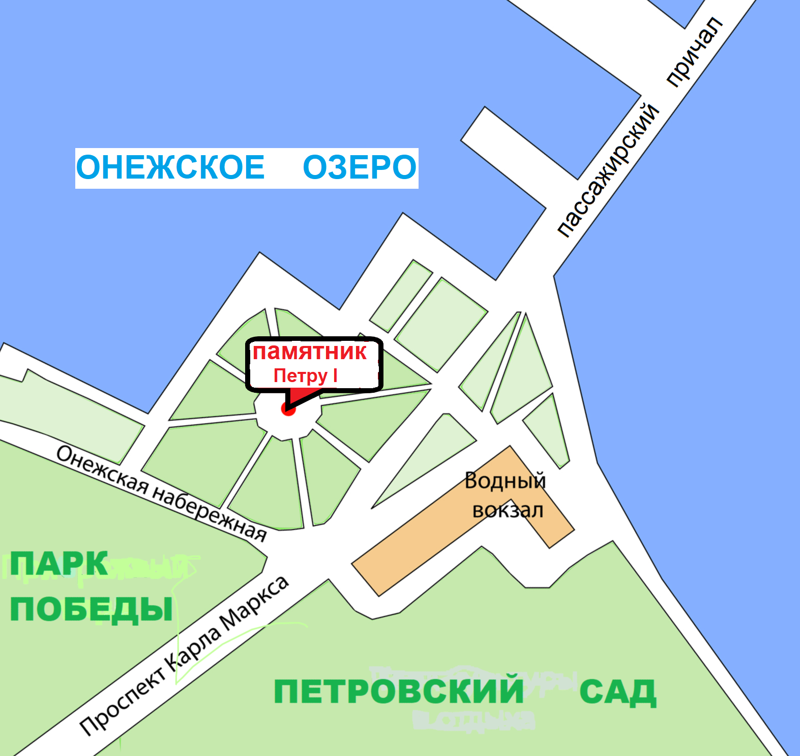 Карта "окрестностей" памятника Петру Первому в Петрозаводске